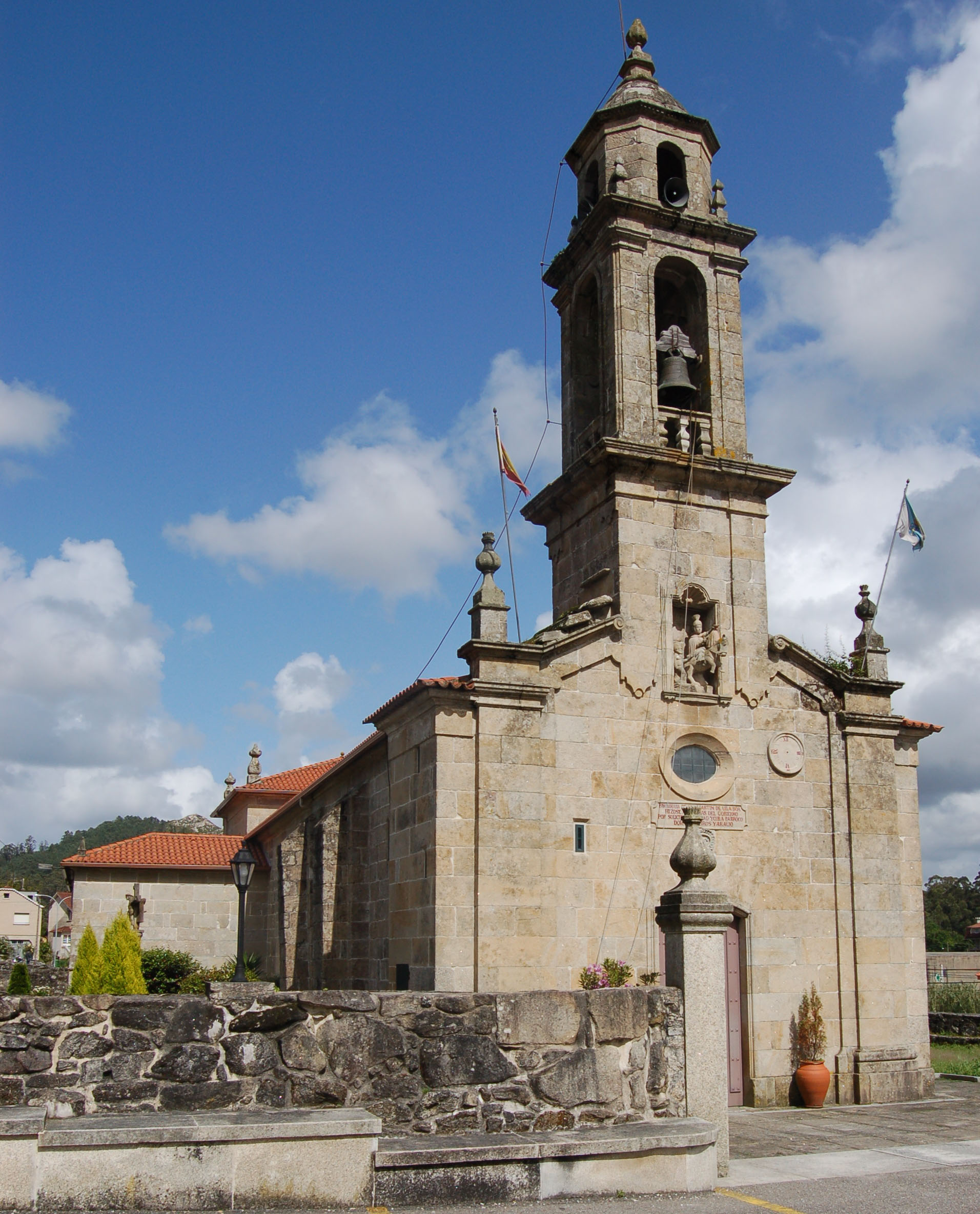 Igrexa parroquial de San Martiño de Vilaboa (Vilaboa)